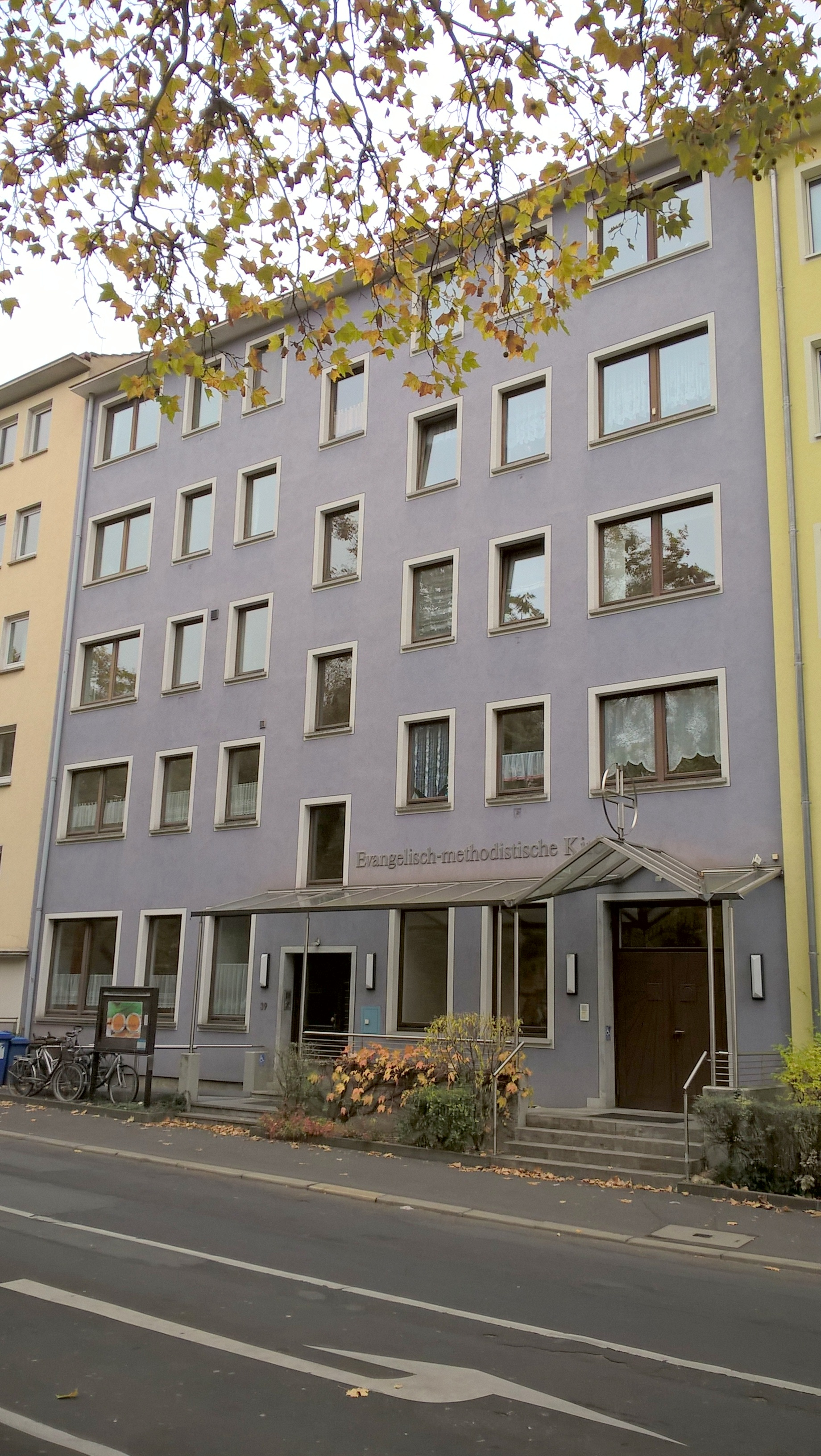 Evangelisch-methodistische Christuskirche Würzburg (Sanderau)